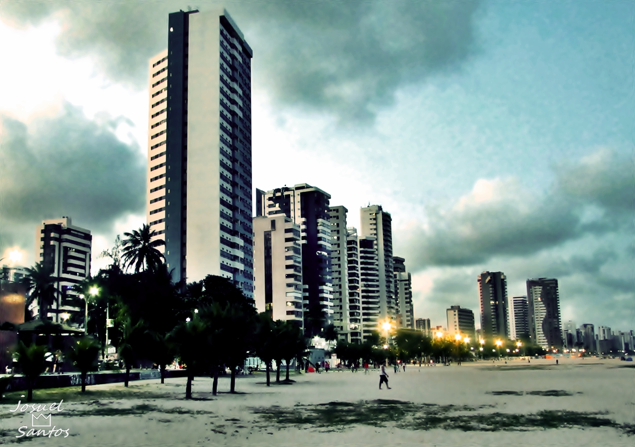 Orla da praia de Candeias num fim de tarde.